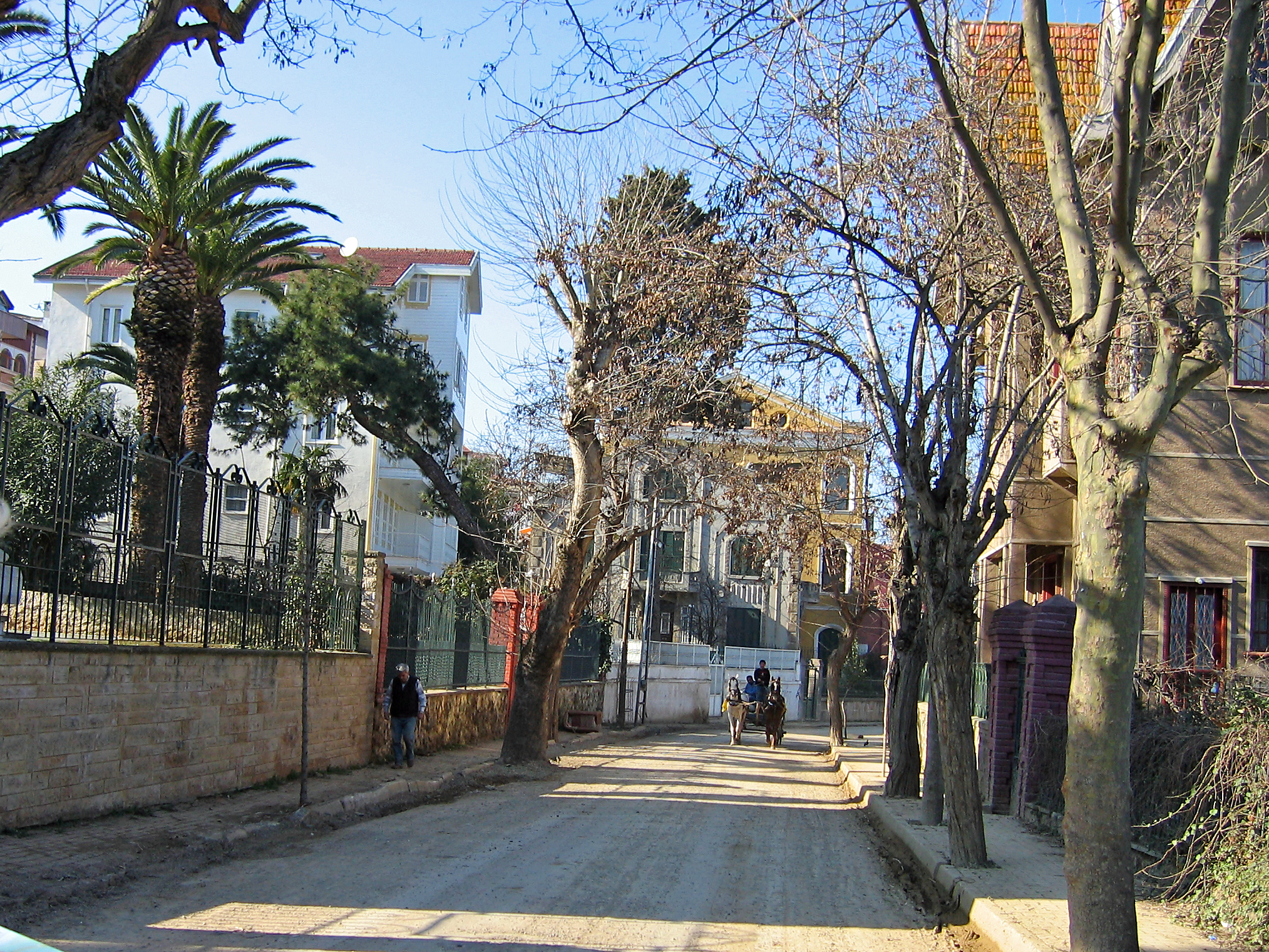 Prinseneilanden (Adalar)Büyükada,Istanbul, Zee van Marmara